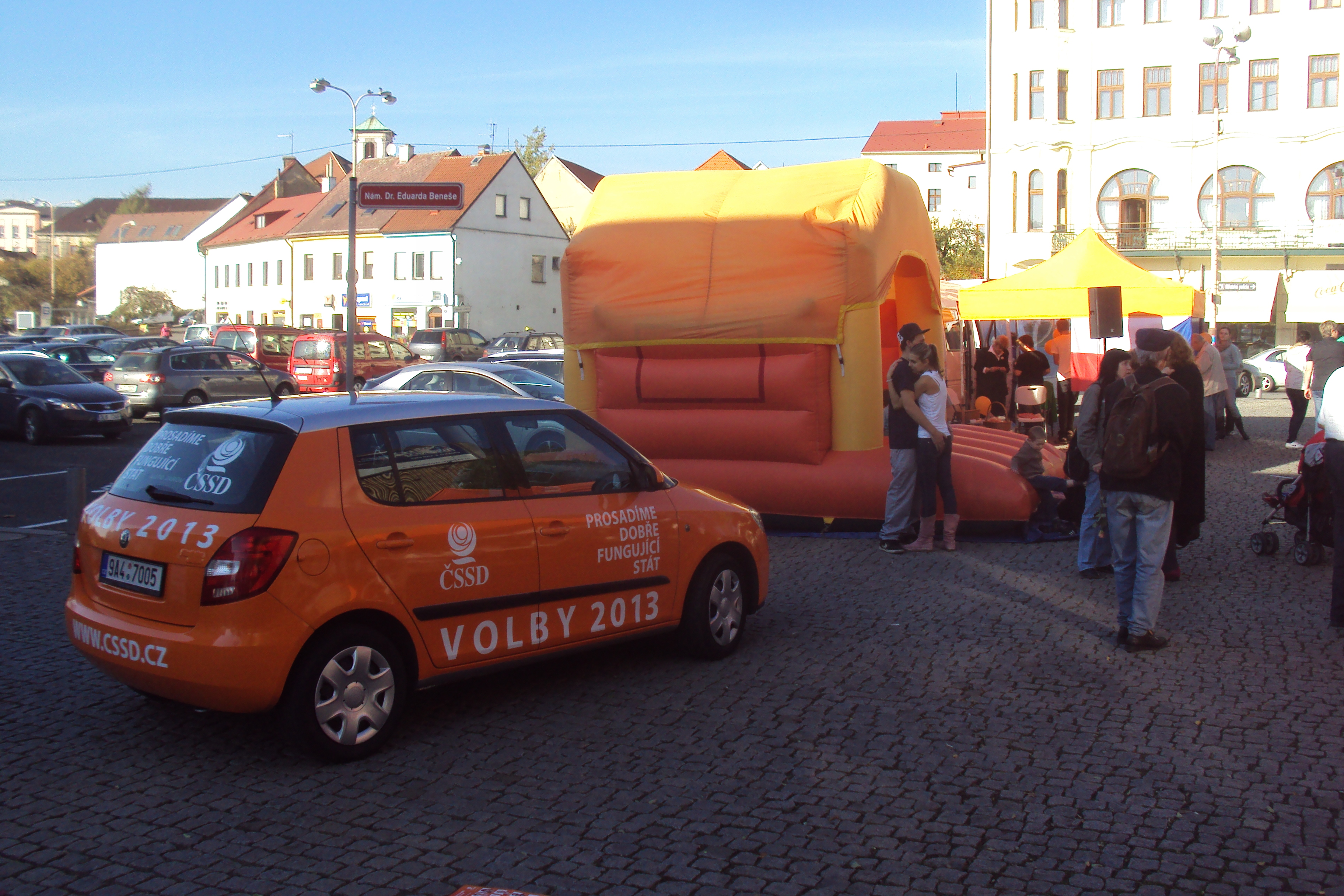 Předvolební akce ČSSD v České Lípě, říjen 2013